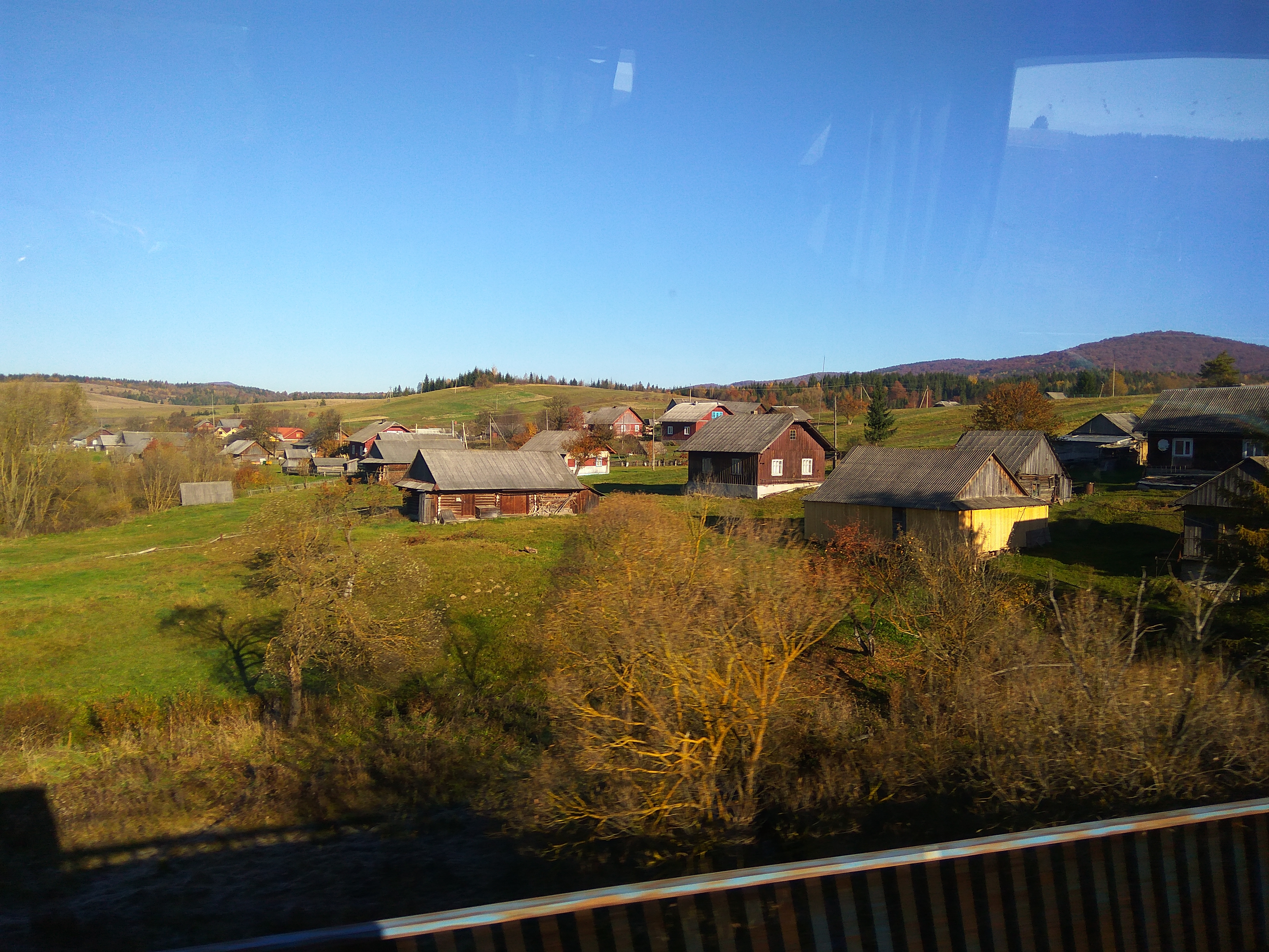 с. Сможе